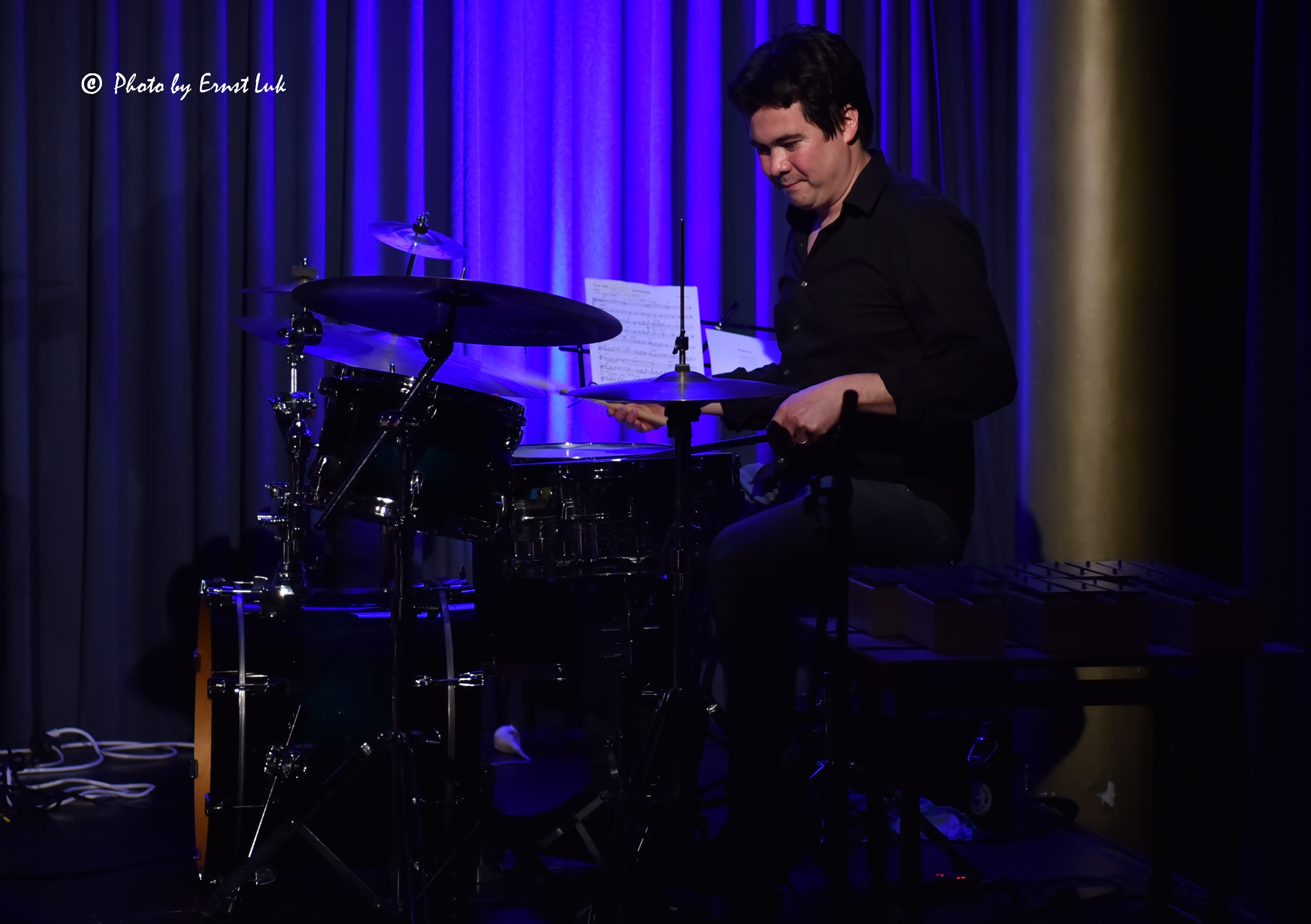 24.05.2017 Trio Molino - Säule Jazz Duisburg